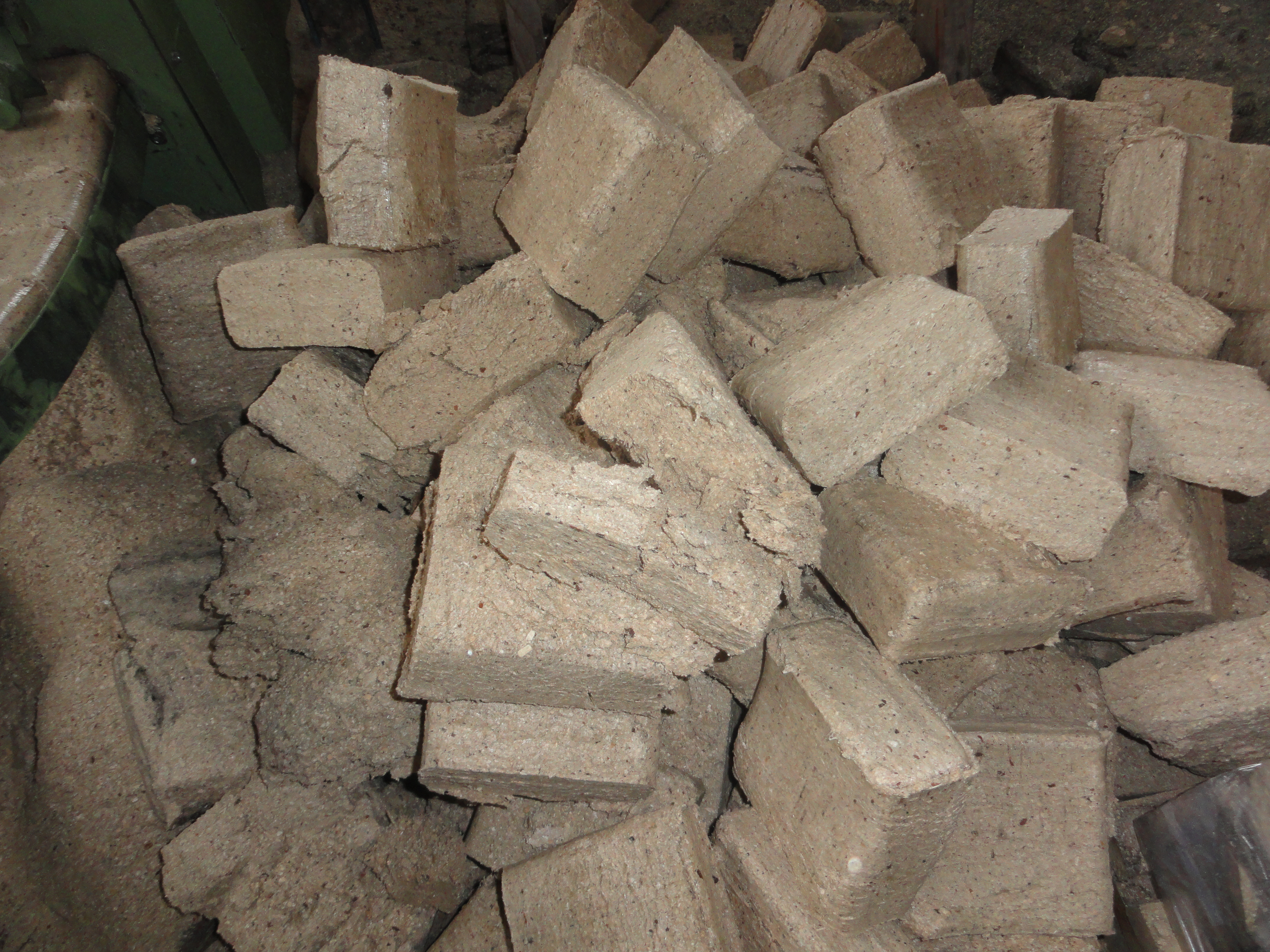 Прессованные брикеты из опилок. Фото сделано на деревообрабатывающем производстве, выпускающее данные брикеты из отходов (как побочный продукт).